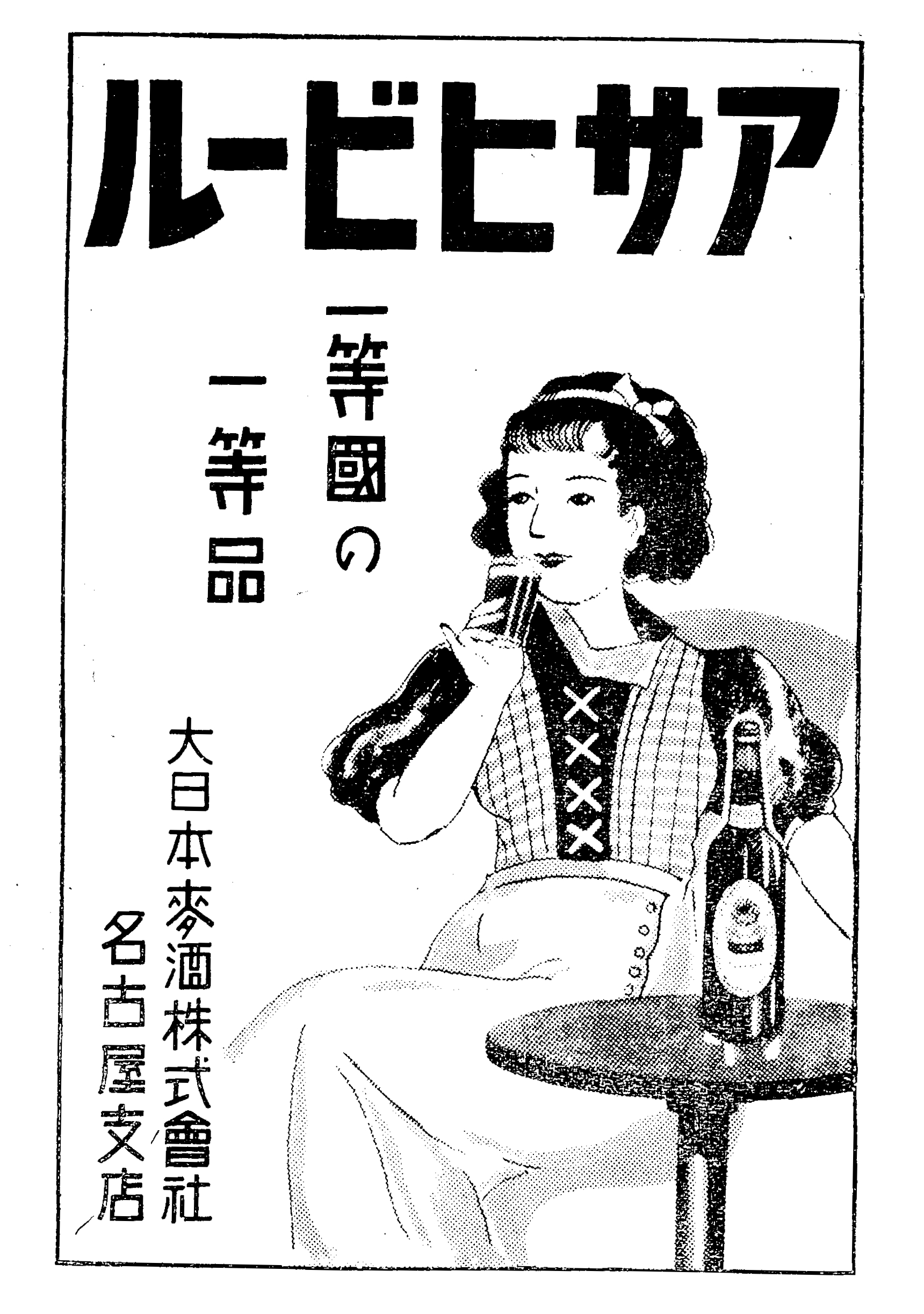 大日本麦酒株式会社時代のアサヒビールの広告